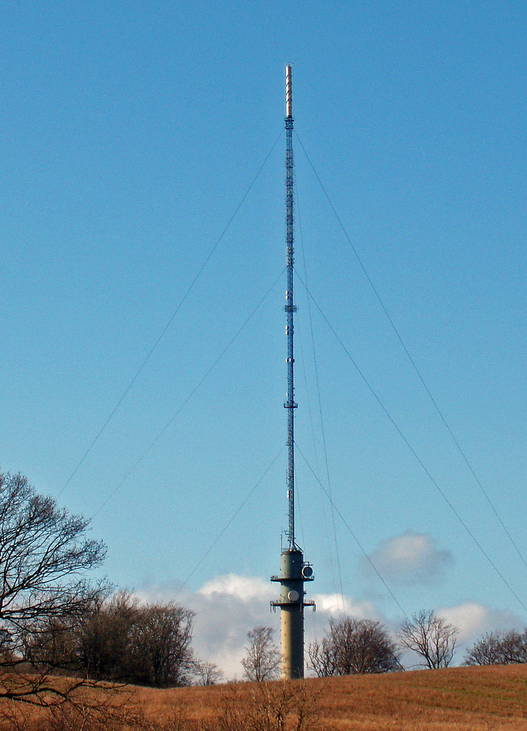 Søsterhøjsenderen ved Århus